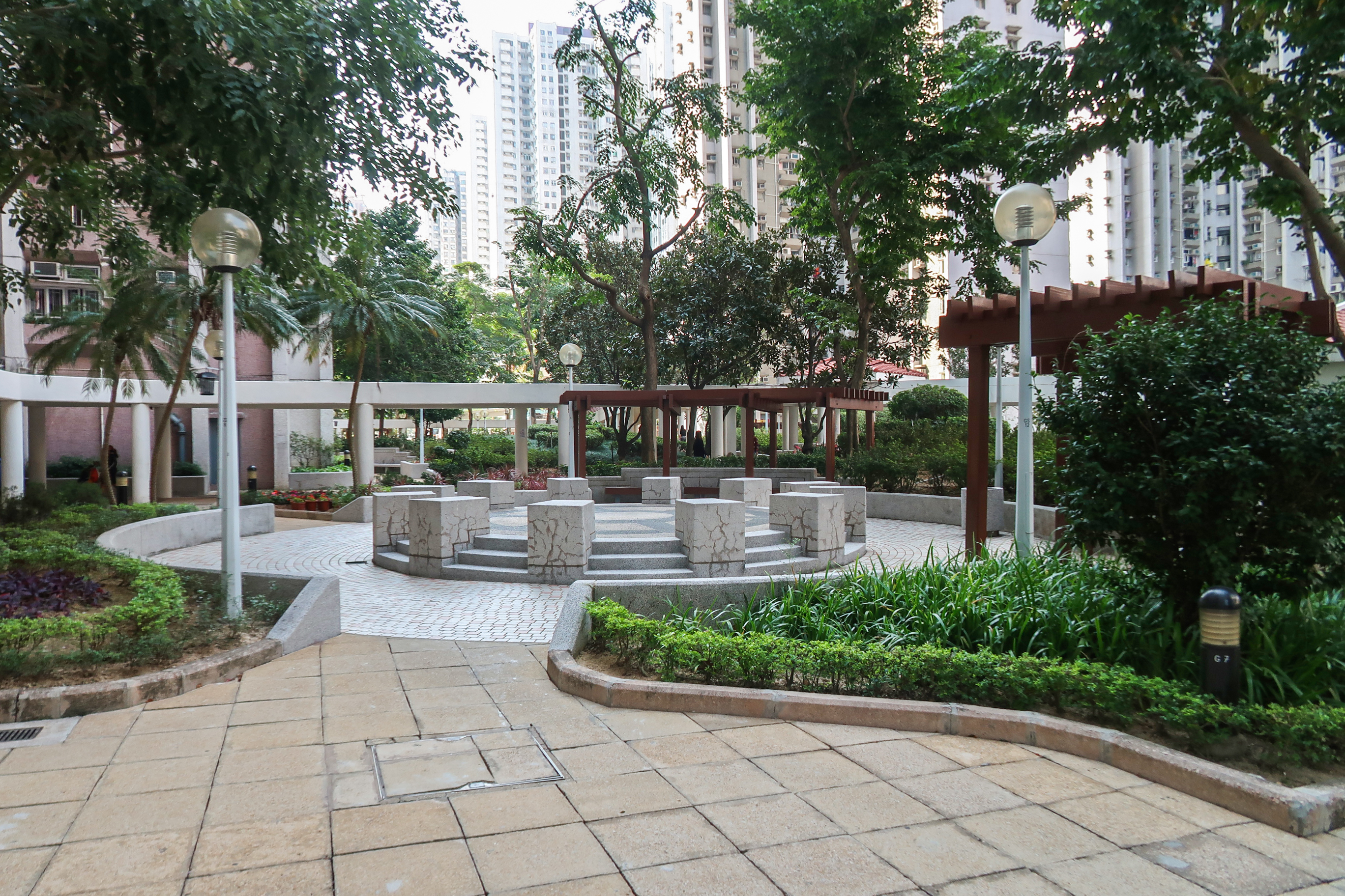 Siu Lun Court Landscape area